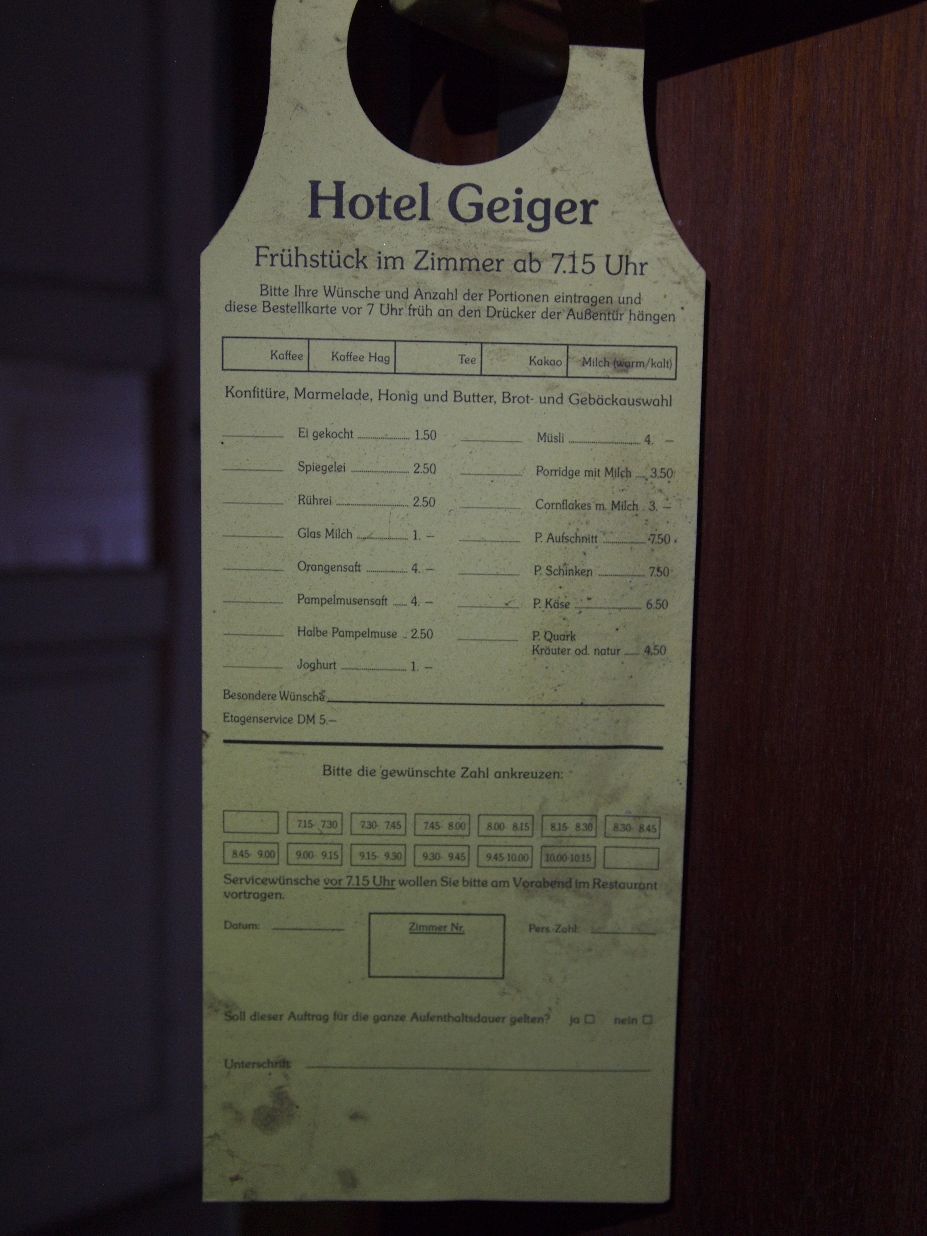 Hotel Geiger, Türkärtchen